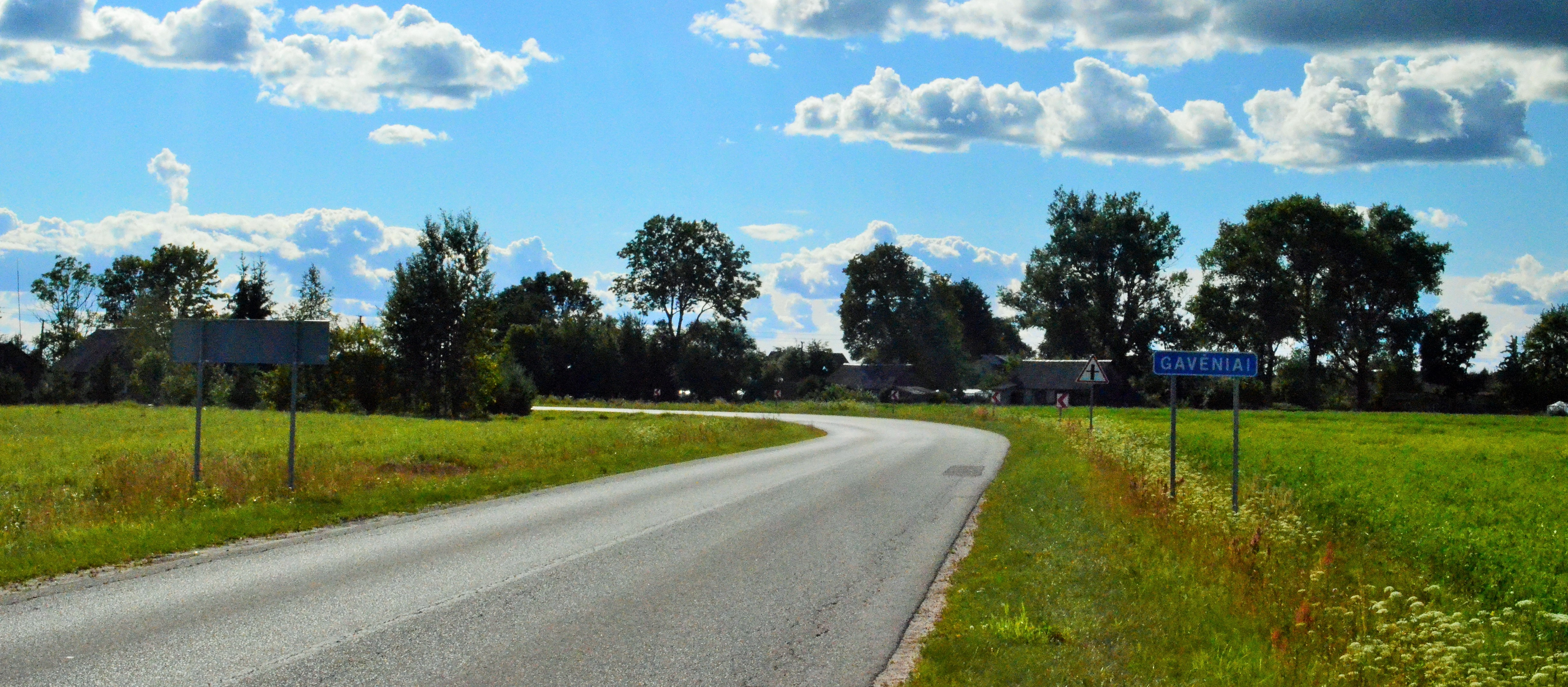 Gavėniai, Širvintų raj.